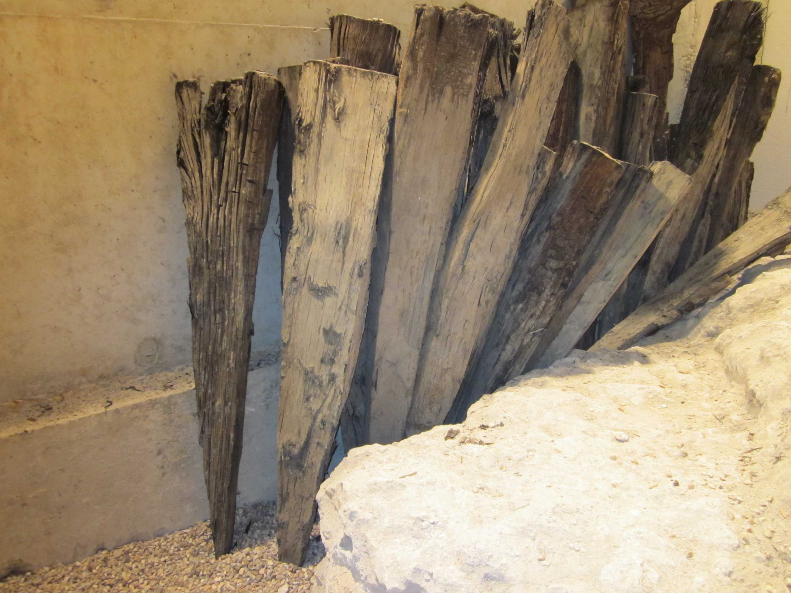 pieux de fondation du temple gallo-romain de Tours